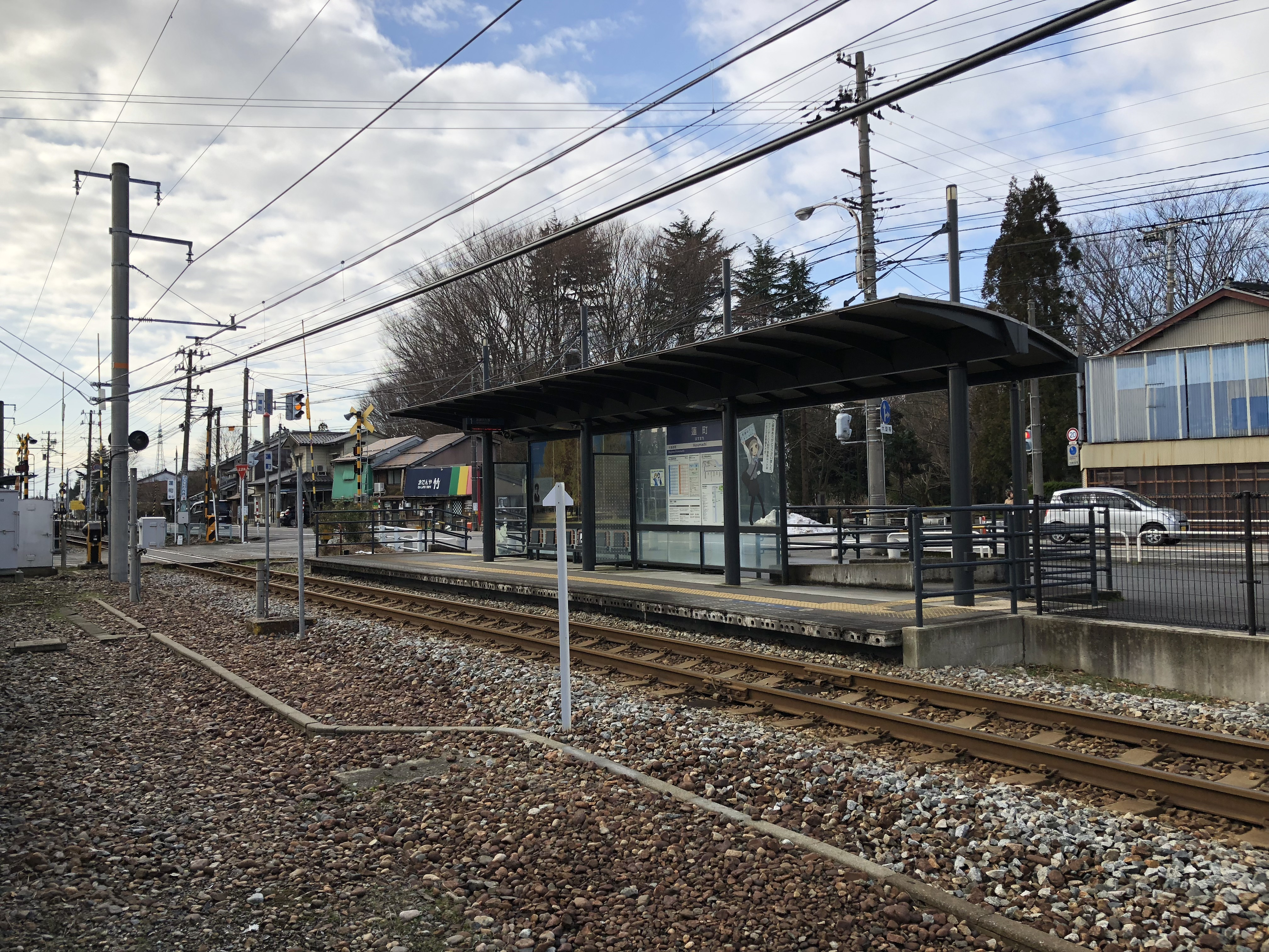 富山ライトレール富山港線蓮町駅